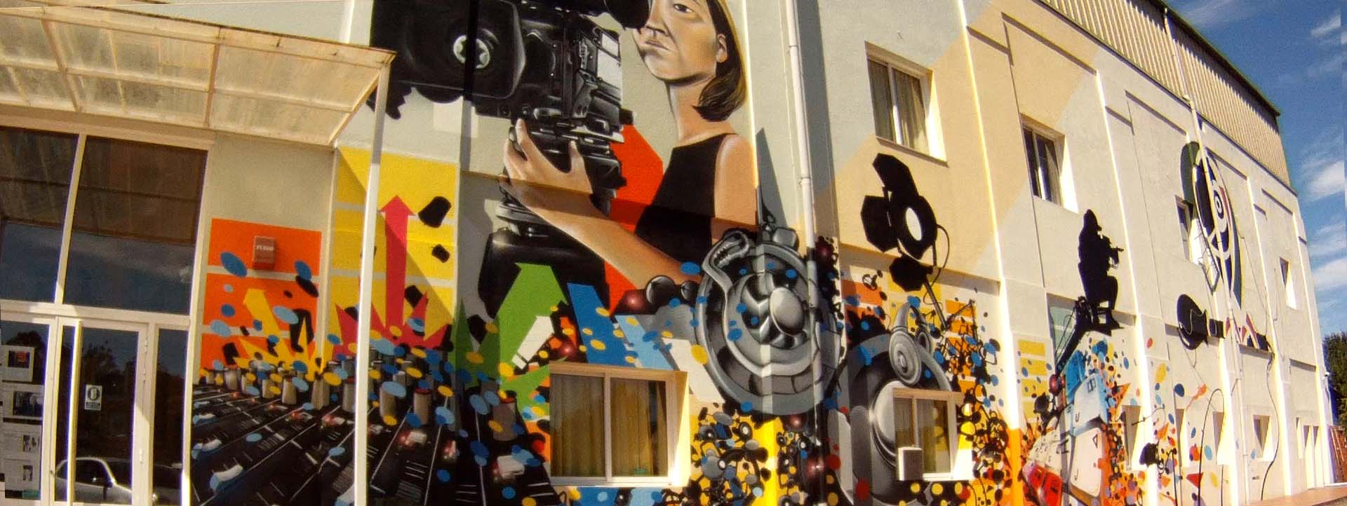 Edificio y entrada a la Escuela de Imagen y Sonido de Vigo, se trata del edificio principal donde se encuentran las dependencias principales.